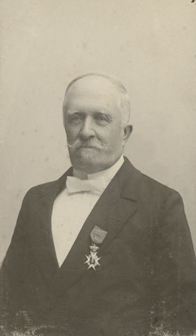 Peter von Möller (1809-1883)